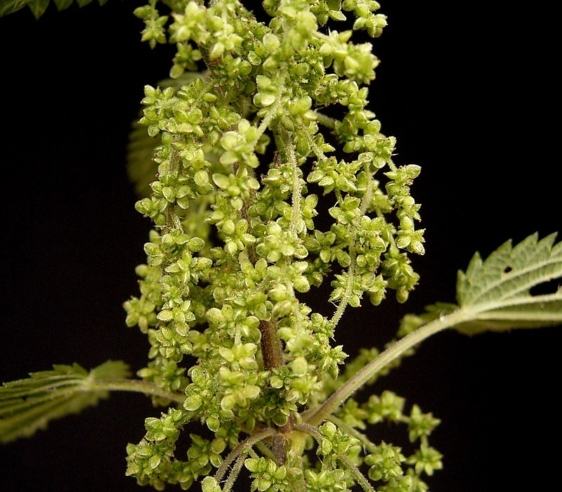 Urtica dioica